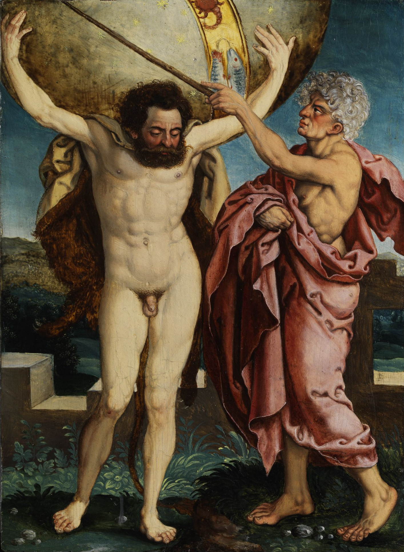 nach dem Stich von Heinrich Aldegrever, 1550